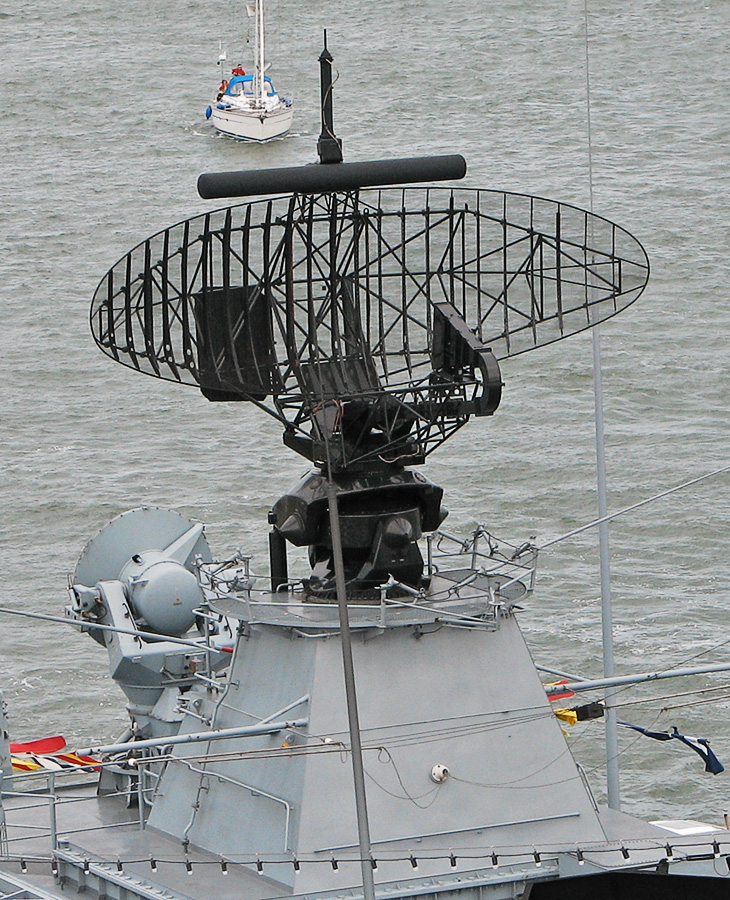 Beschreibung: Radarantenne der Fregatte Mecklenburg-Vorpommern / F218 / Klasse F123 Fotograf: Darkone, 13. August 2005